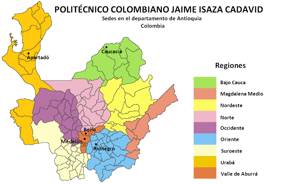 Mapa de localización de las sedes del Politécnico Colombiano Jaime Isaza Cadavid en el departamento de Antioquia, Colombia.